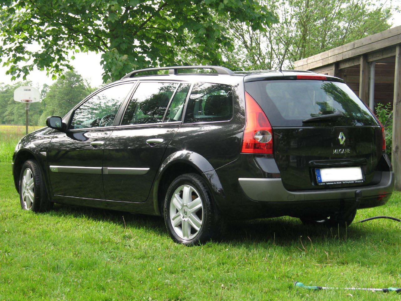 Heck des Renault Megane Grantour